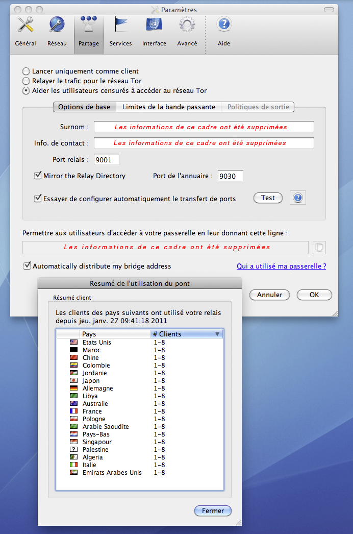 Fenêtres Tor d'un relais avec indication de pays d'internautes qui ont utilisés une passerelle pour aider des utilisateurs censurés (internautes censurés ou non). [Tor and the Onion Logo are registered trademarks of The Tor Project, Inc. Content on this site is licensed under a Creative Commons Attribution 3.0 United States License, unless otherwise noted.]